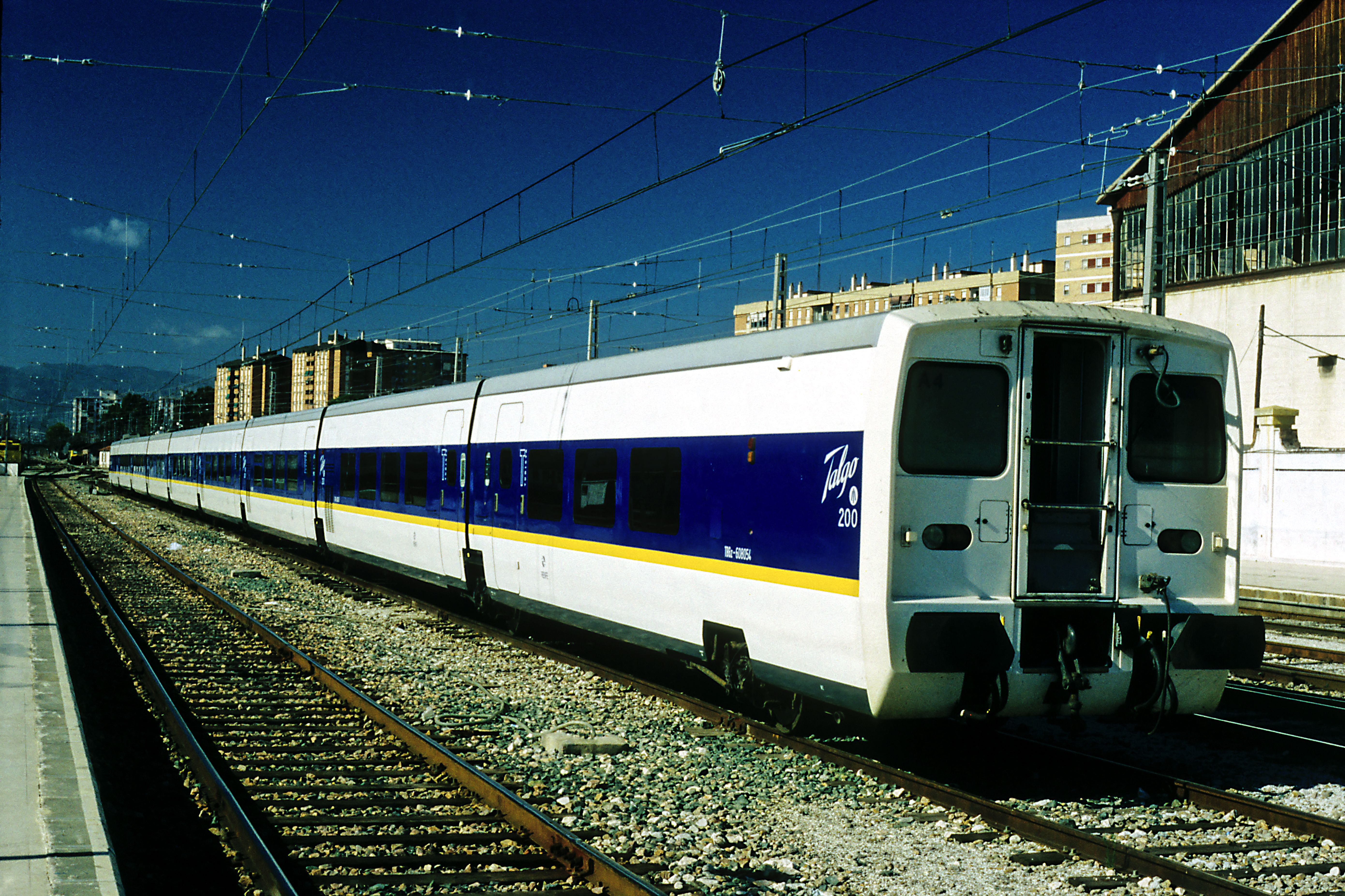 Talgo-6-Wagenzug im noch glänzenden Neulack vor der Fahrt von Málaga über Córdoba C nach Madrid Atocha